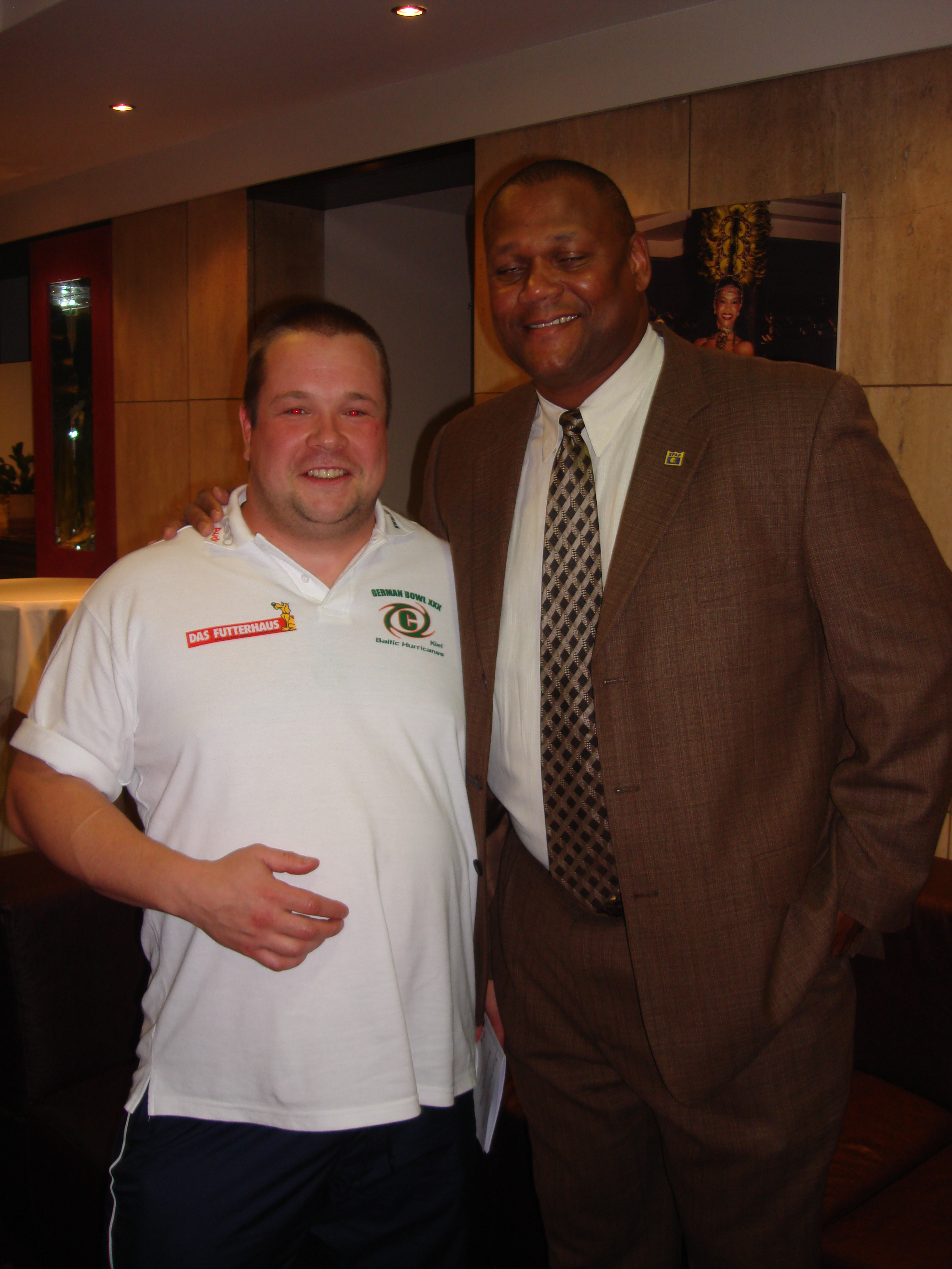 Перед первым финалом во Франкфурте на Майне. Алексей и Майкл Уилсон четырех кратный обладатель перстня Super Bowl.